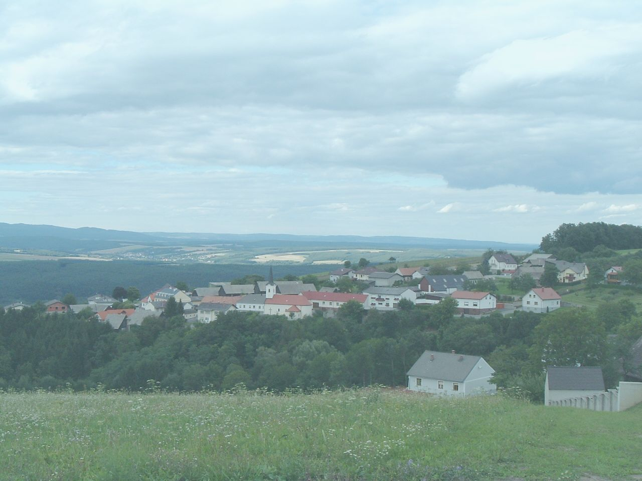 Oberkohlstätten, Burgenland, Austria